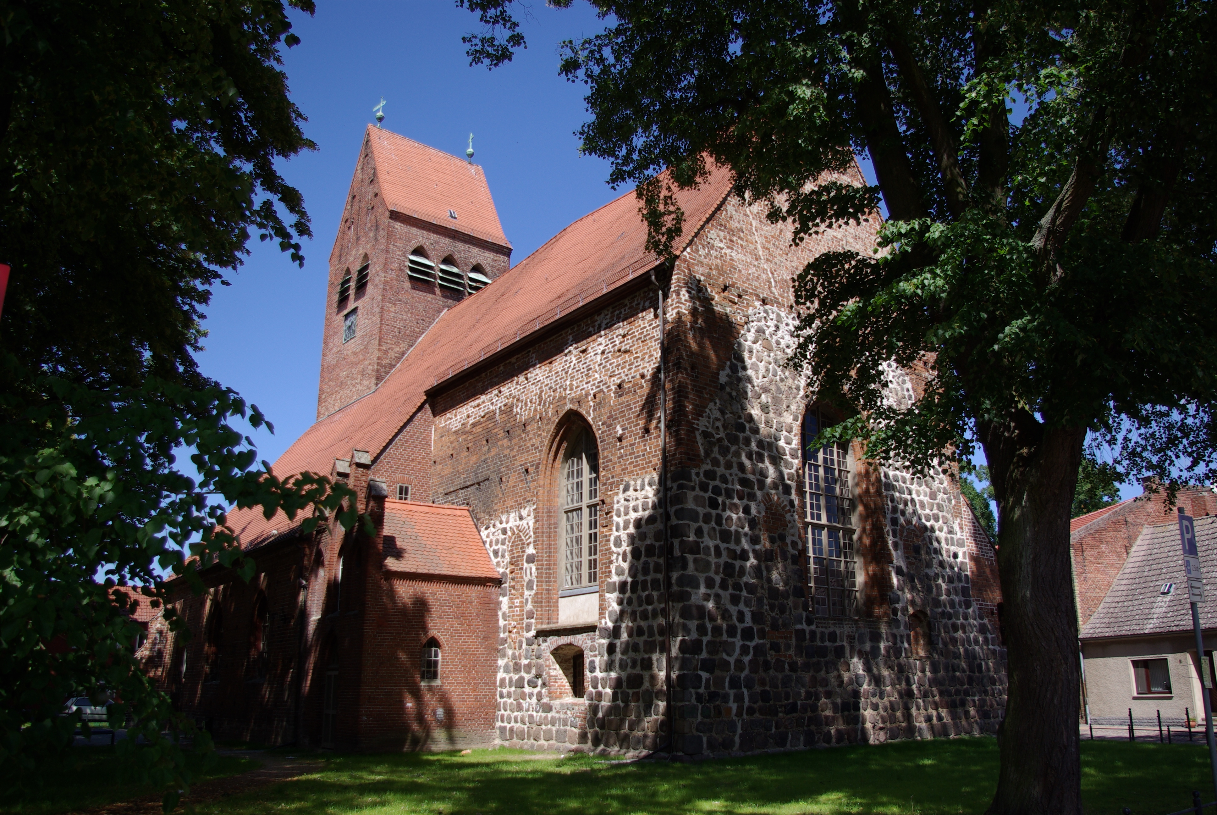 Kremmen in Brandenburg. Die Kirche in Kremmen steht unter Denkmalschutz.